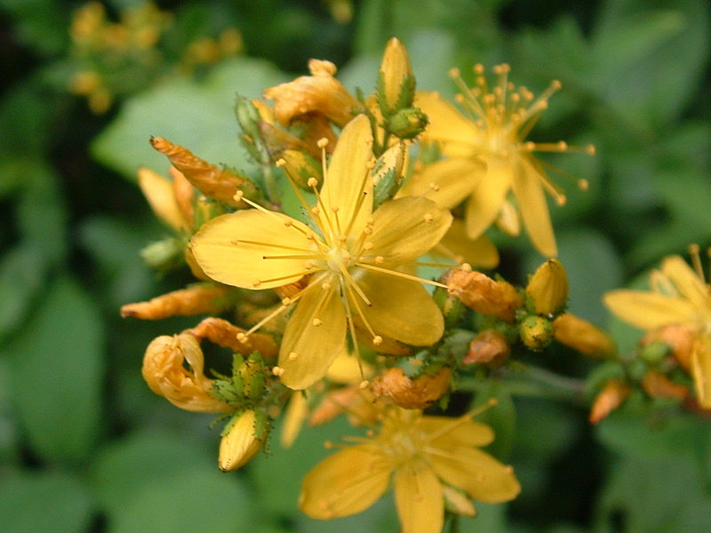 Hypericum hirsutum L. Laroque (Gironde, France) 2004 - GFDL